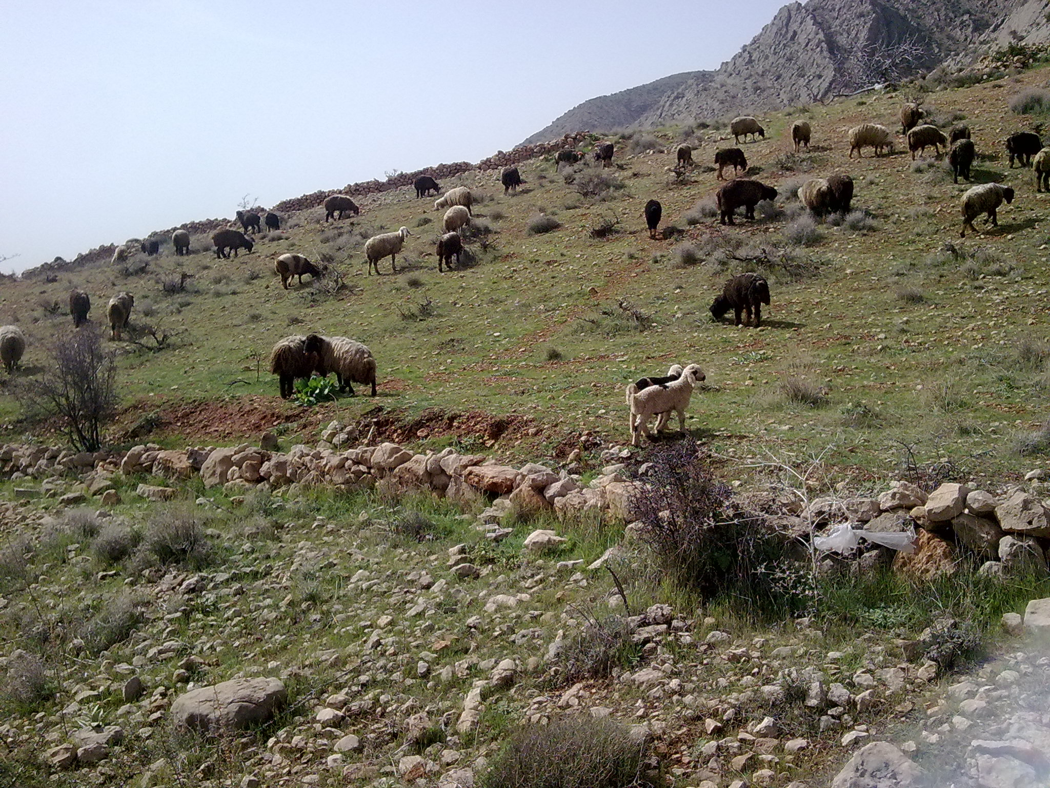 کوه دراک